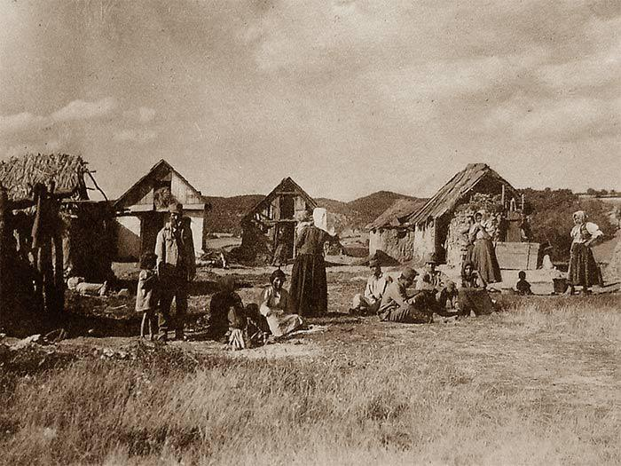 Cigánska osada niekde na juhu Slovenska. Zo začiatku 20. storočia